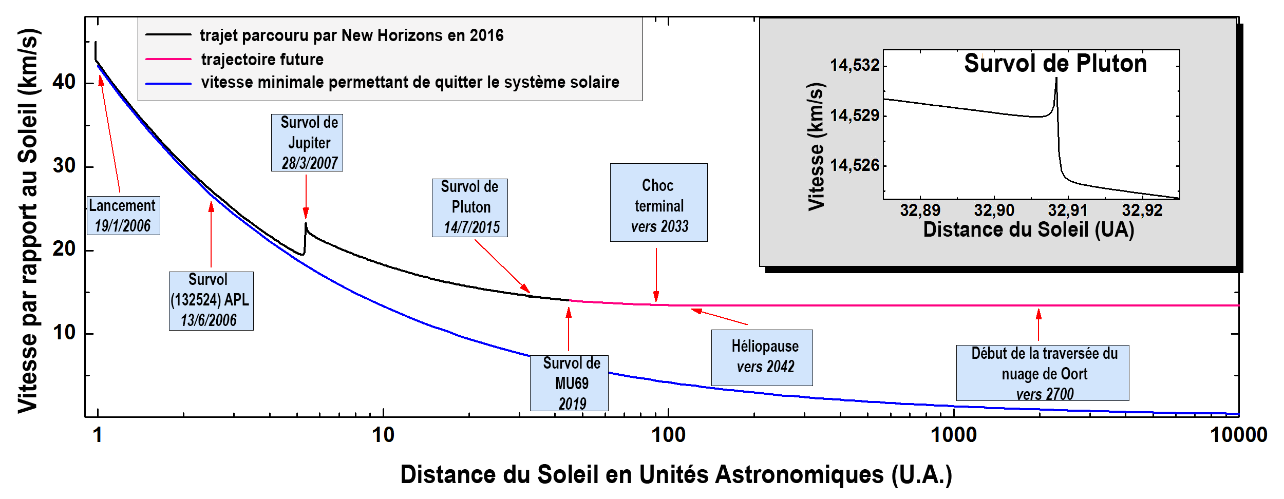 Trajectoire de la sonde spatiale New Horizons : vitesse et distance du Soleil (légendes en francais)